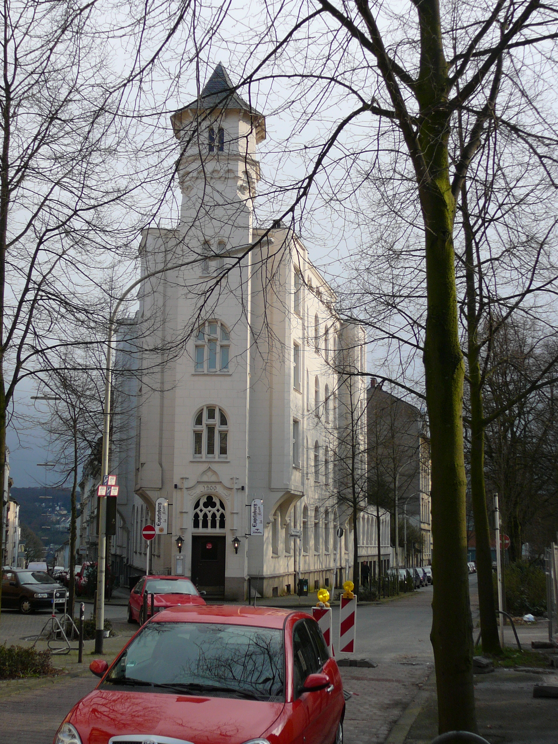 Platz der Republik, Wuppertal